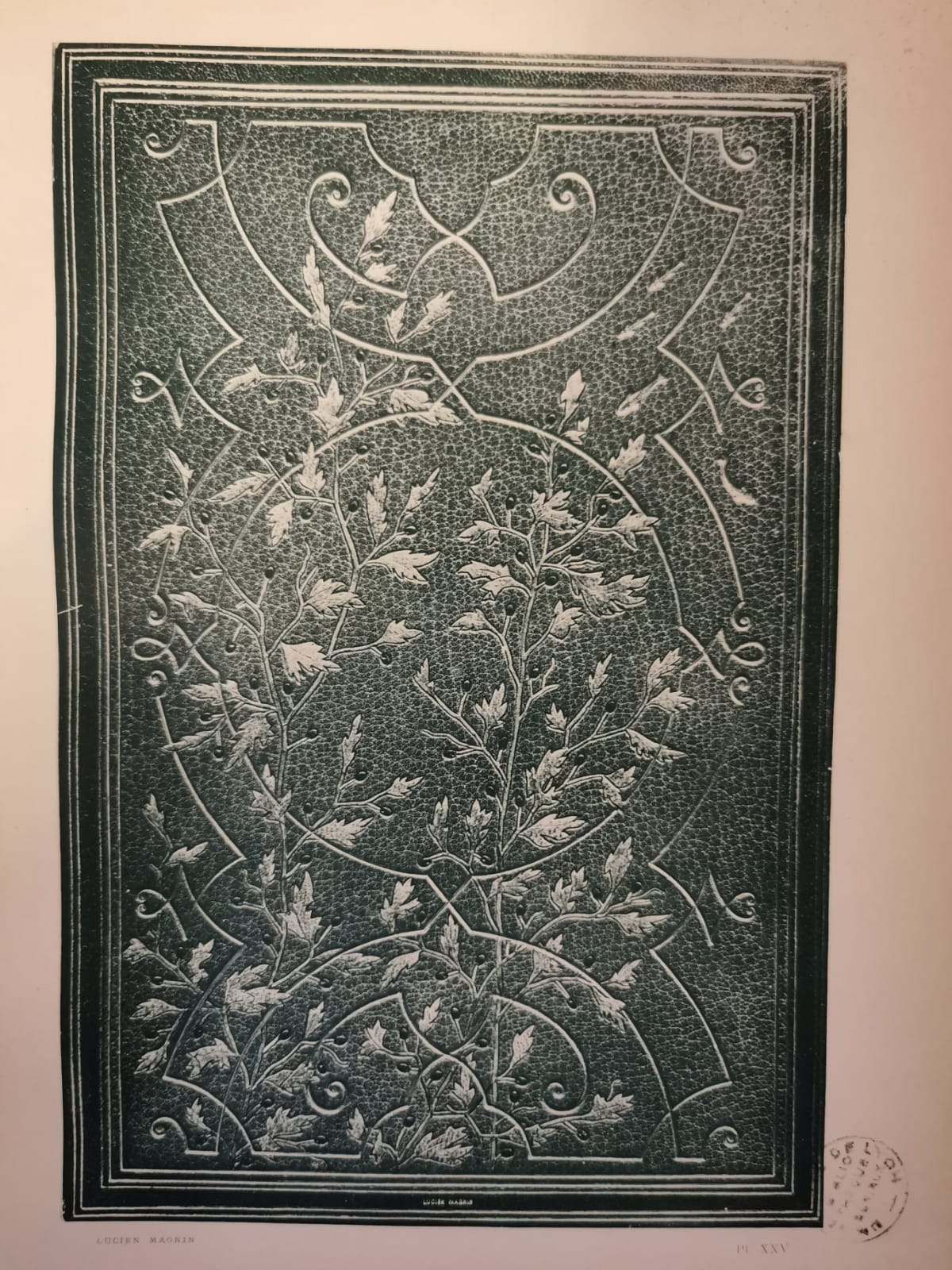 Pêcheur d'Isalnde, par Pierre LOTI. Paris, Calmann-Lévy, 1893. Grand in-8° - Exemplaire sur Japon Maroquin bleu paon janséniste. - Doublures maroquin gris cendre, décorées de filets dorés droits et courbes sur toute la surface; branches d'algues marines jetées sur les filets ; feuilles vertes, très variées de tons, fruits rouges, le tout mosaïqué à froid. Gardes de soir brochée. - 1894. Exposition universelle de Lyon, 1894. M. Etienne Rey, à Lyon